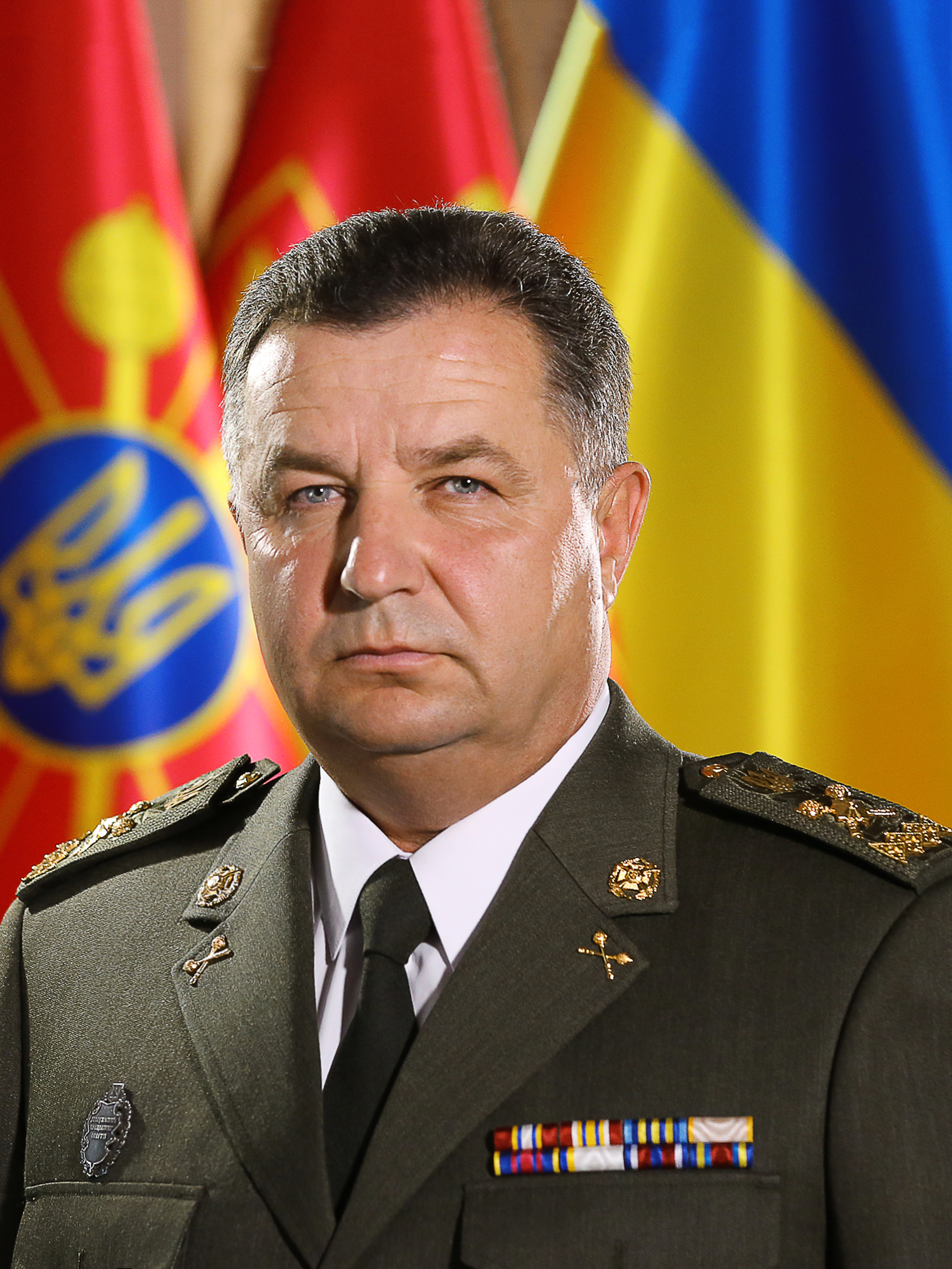 Полторак Степан Тимофійович